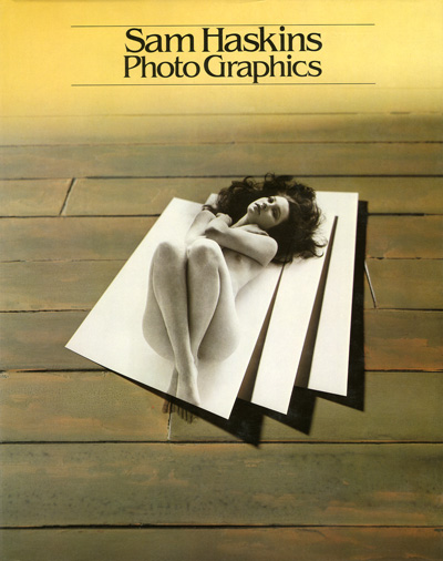 Titelbild des Bildbandes Photo Graphics